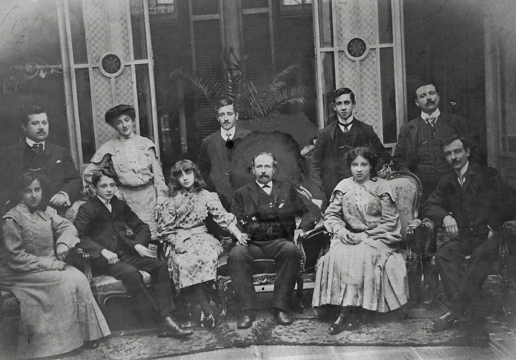 El empresario Pedro Vasena, rodeado de su familia.